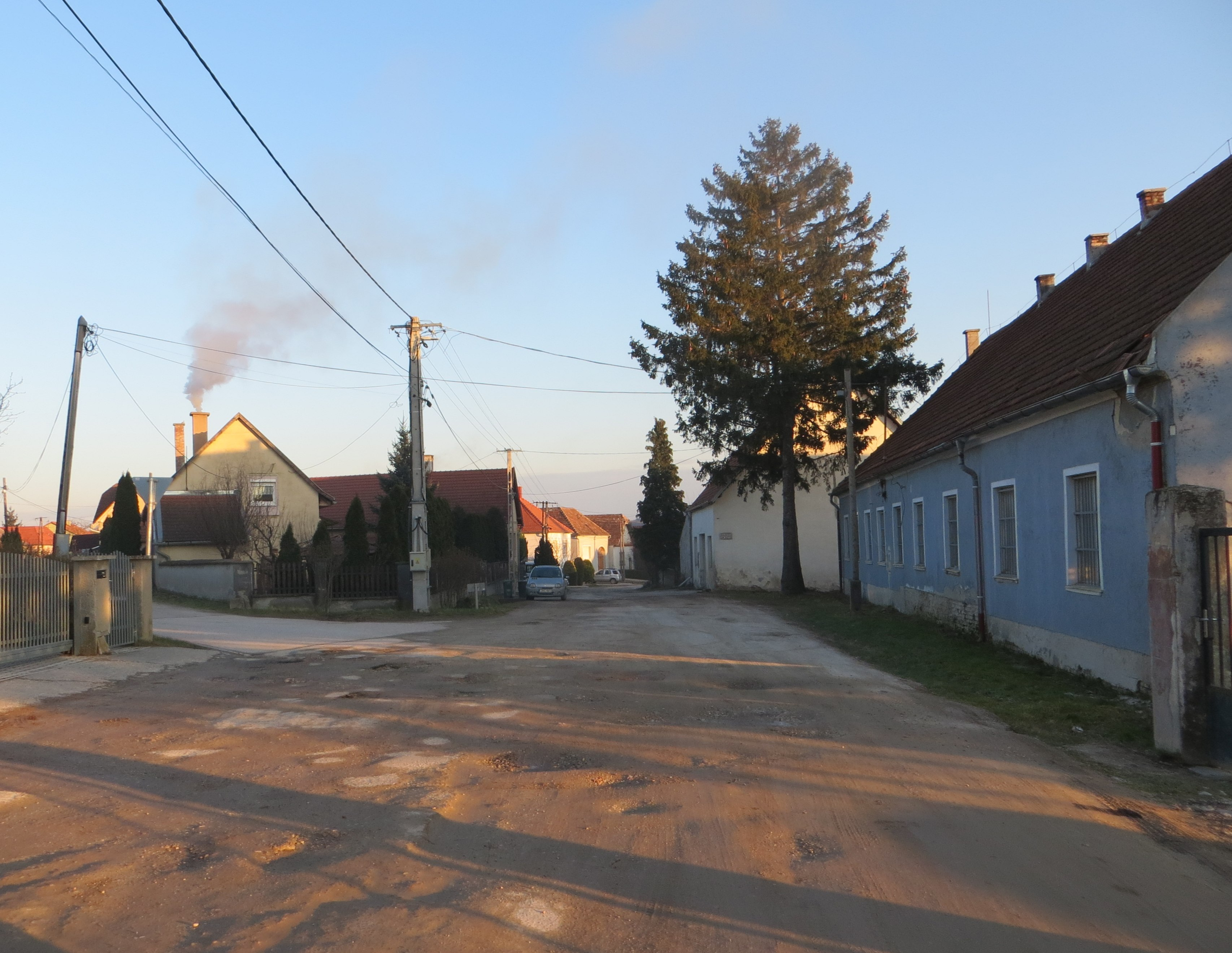 eine unasphaltierte Straße in Agendorf